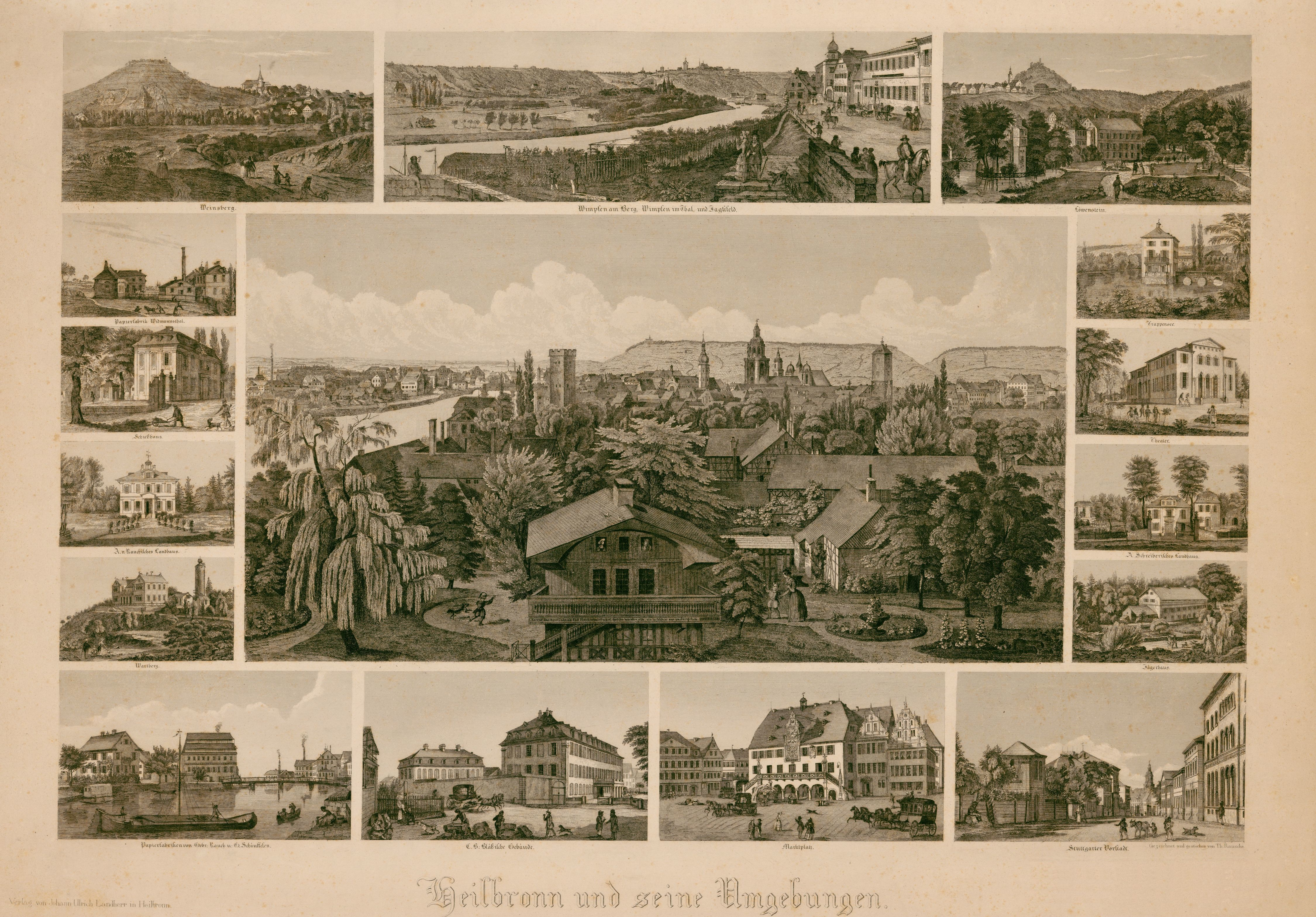 Heilbronn und seine Umgebungen. Stahlstich, 37,5 × 55 cm, Verlag Landherr, Heilbronn. Hauptansicht: Heilbronner Stadtbild von Süden, 16 Nebenansichten: Weinsberg, Wimpfen am Berg, Wimpfen im Tal, Jagstfeld, Löwenstein, Papierfabrik Widmannstal, Schießhaus, Rauch’sches Landhaus, Wartberg, Papierfabriken von Gebr. Rauch und Schäuffelen, C. B. Bläß’sches Gebäude, Marktplatz, Stuttgart Vorstadt, Jägerhaus, Schreiberisches Landhaus, Theater, Trappensee